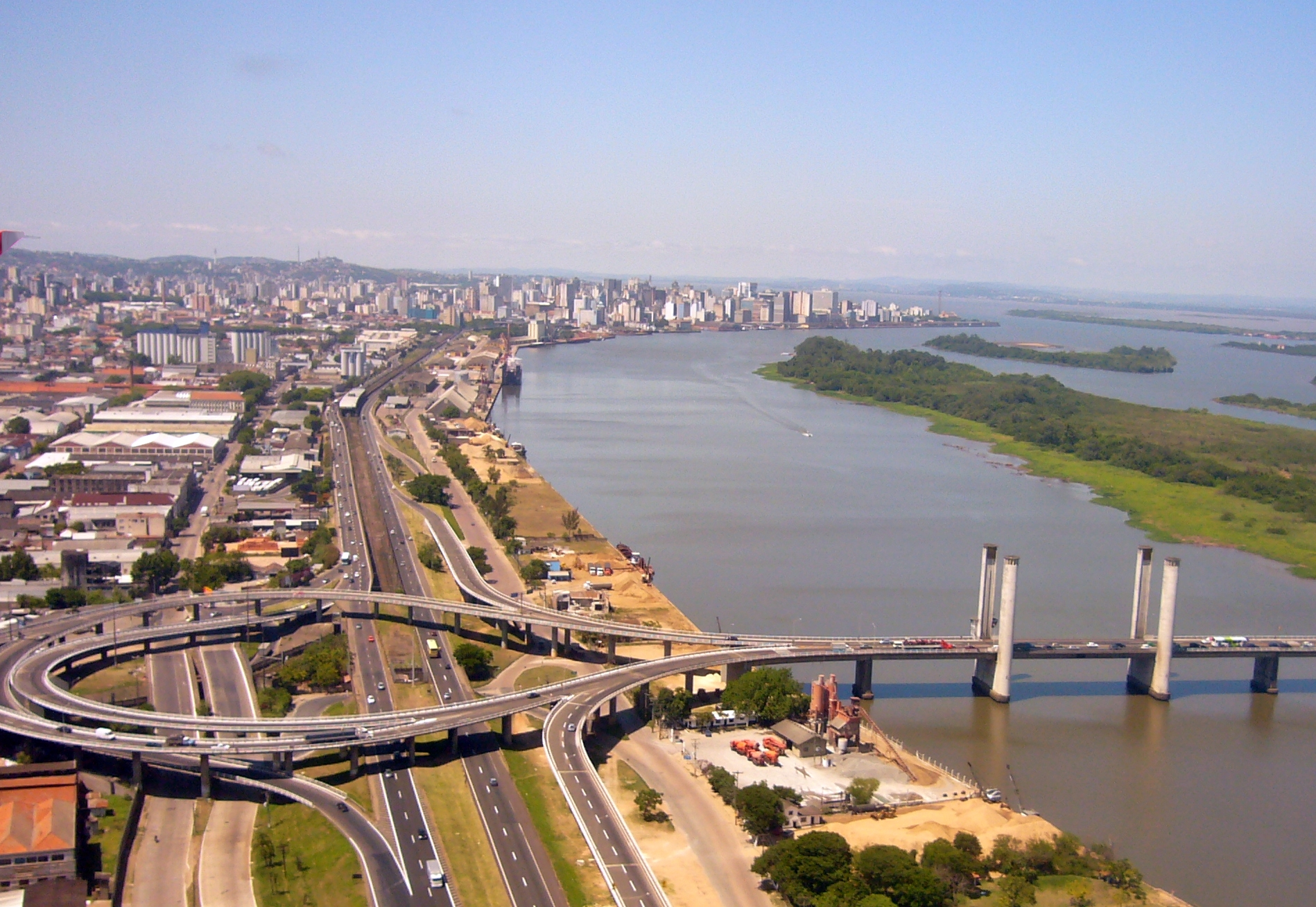 Ponto do Guaíba, Porto Alegre, Brasil.